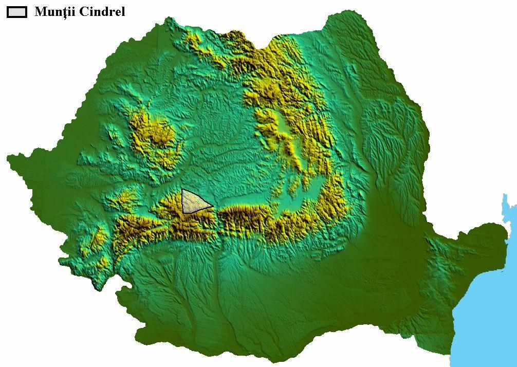 Munţii Cindrel